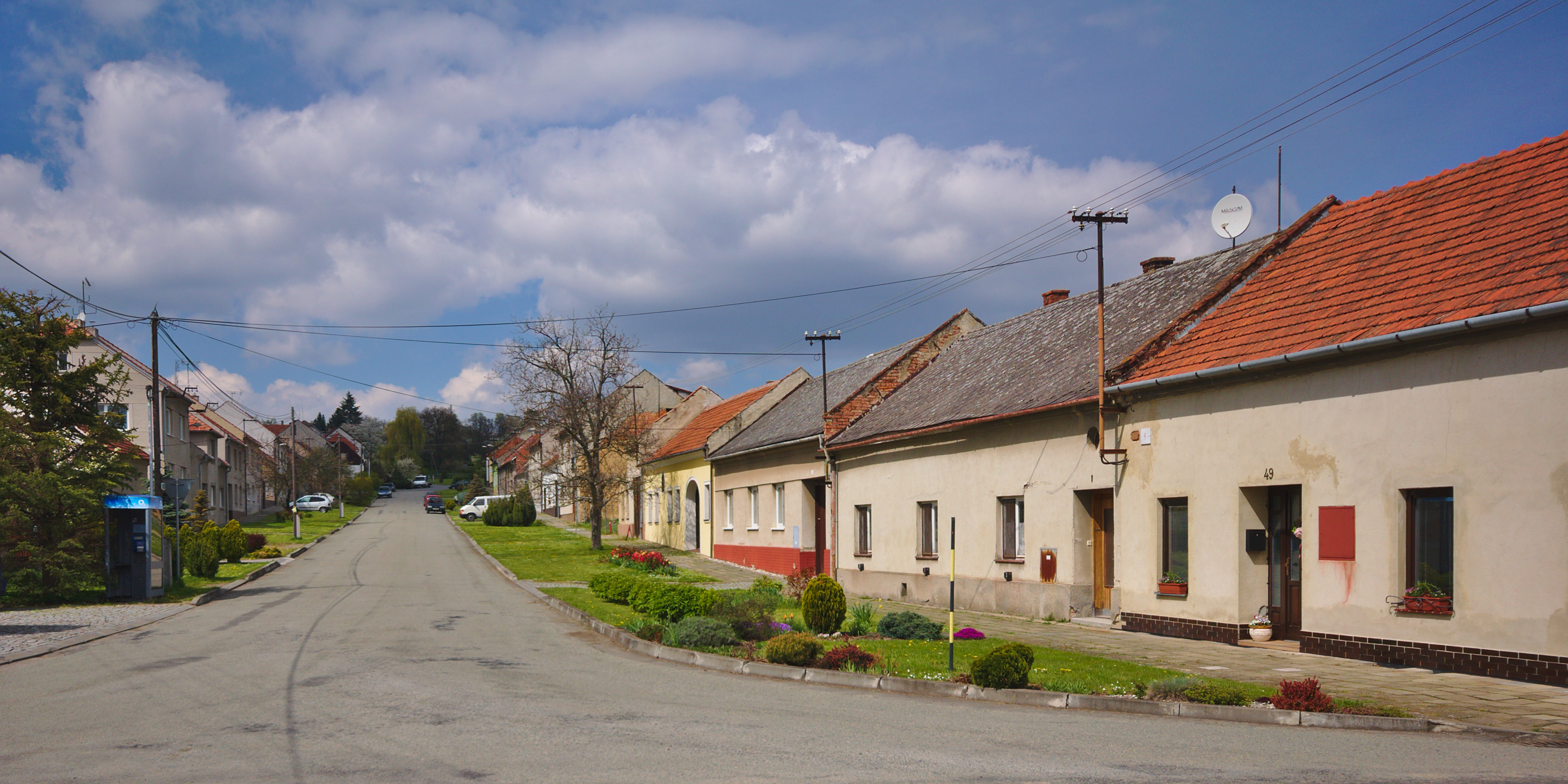 Pohled do obce, Alojzov, okres Prostějov